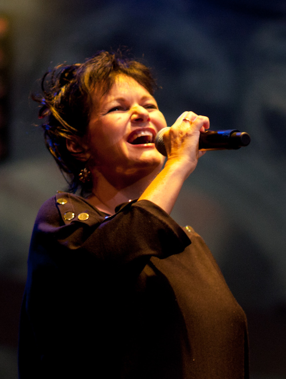 Maurane à la Fête de la Fédération Wallonie-Bruxelles le 24 septembre 2011